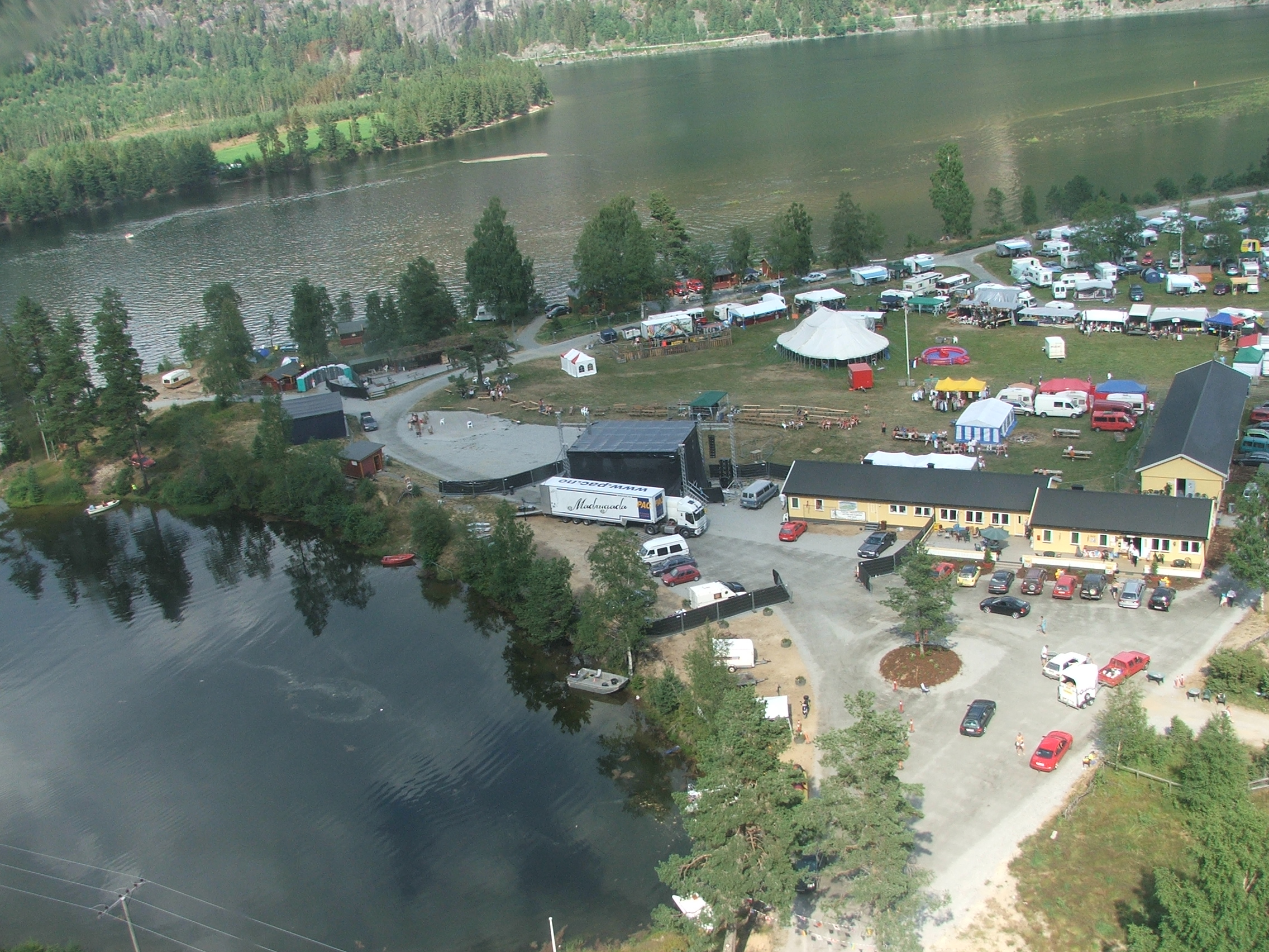 Ose Countryfestival 2006